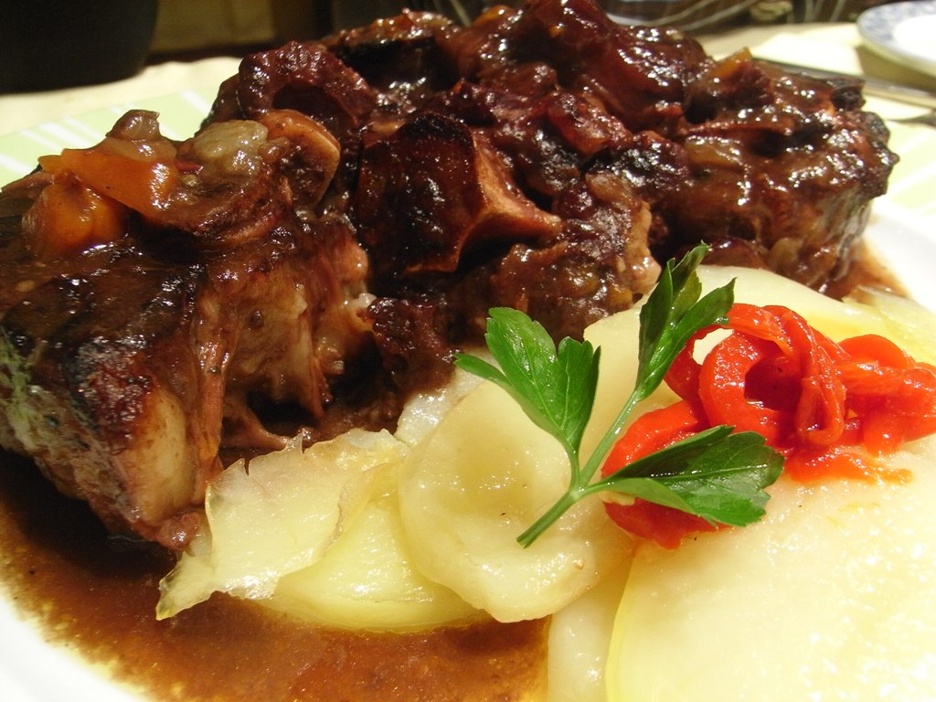 Rabo de toro servido en Madrid. Estofado típico cordobés.